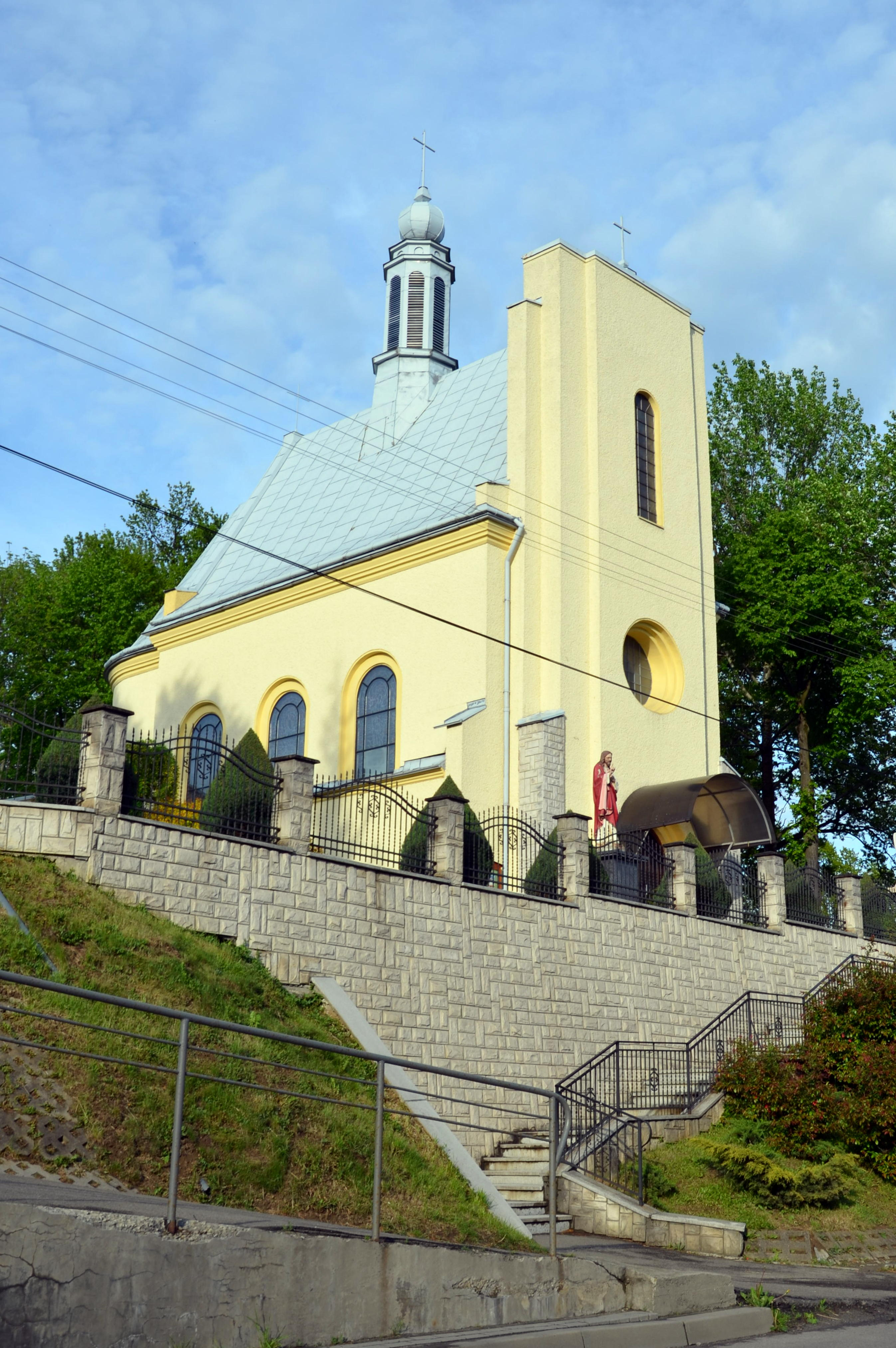 Kirche St. Johannes der Täufer in Pakoszowka